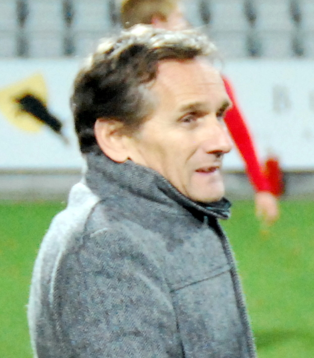 Den tidligere fodboldspiller Allan Simonsen. Her på Viborg Stadion.